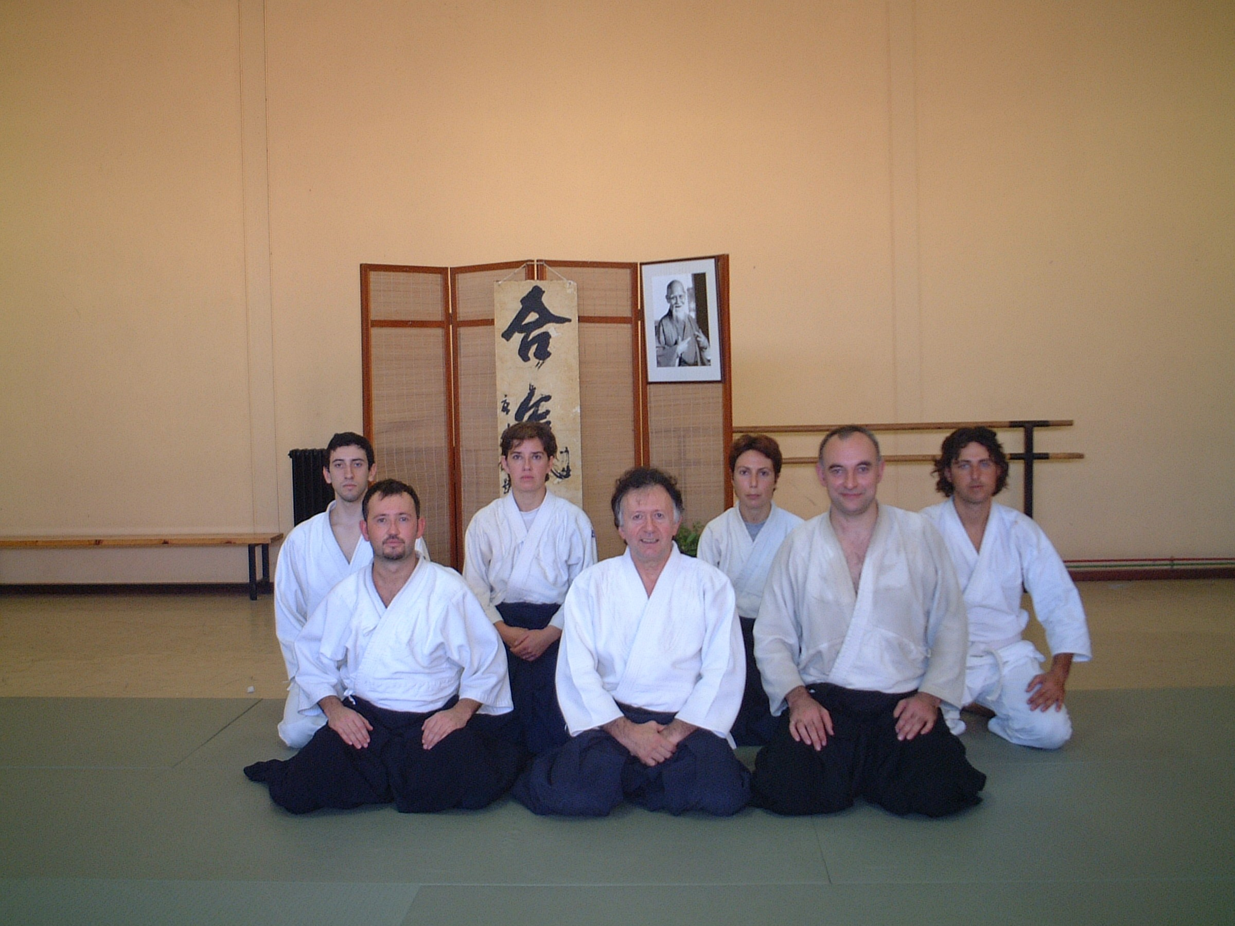 Data: juny 2002 Lloc: Poliesportiu Principes de España, Palma, Balears, Spain